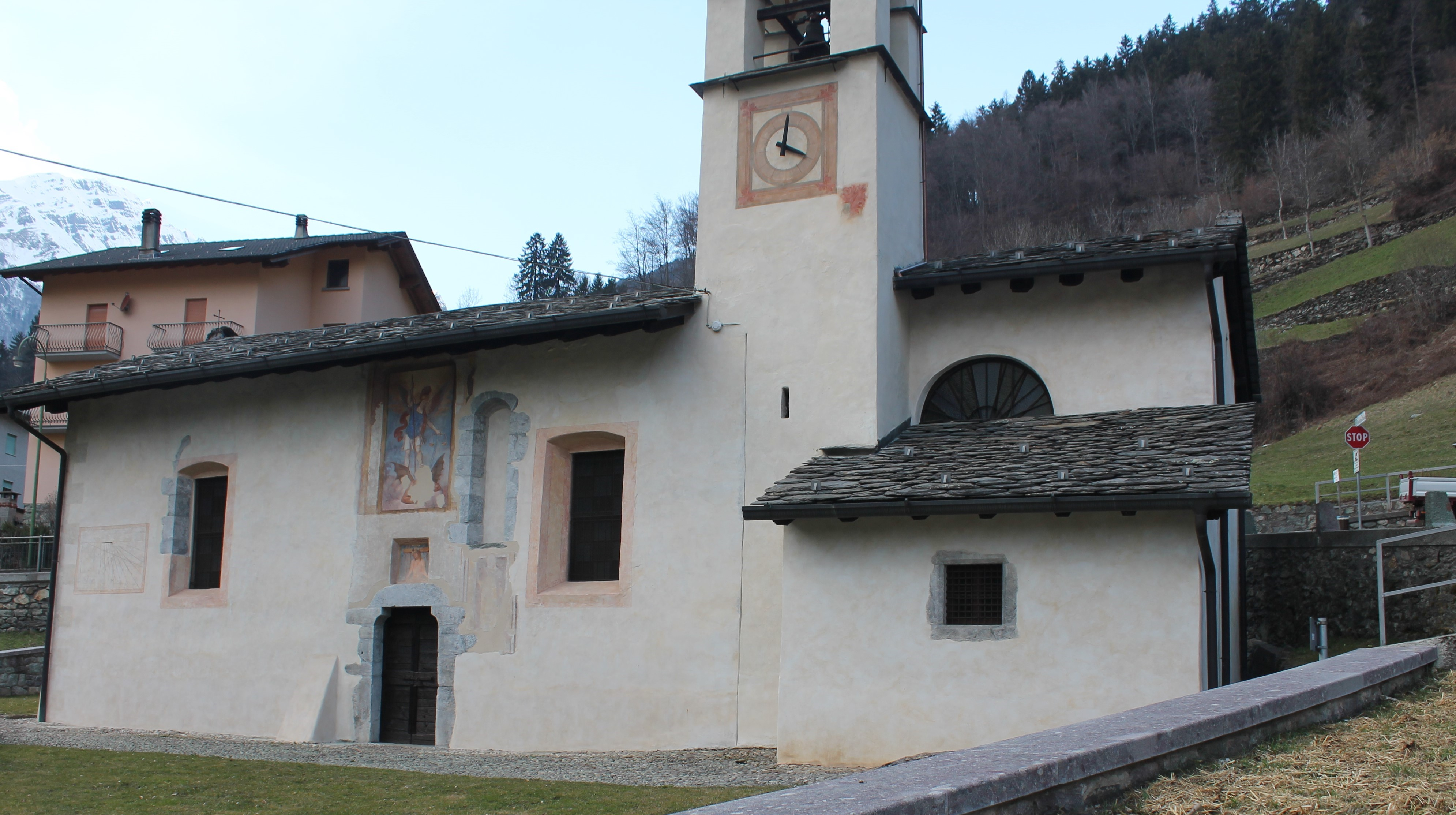 esterno della chiesa di san Michele